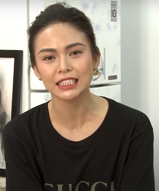 Mâu Thủy, ảnh chụp màn hình từ video của BEE Entertainment/Giải Trí (screen capture from video of BEE Entertainment/Giải Trí).